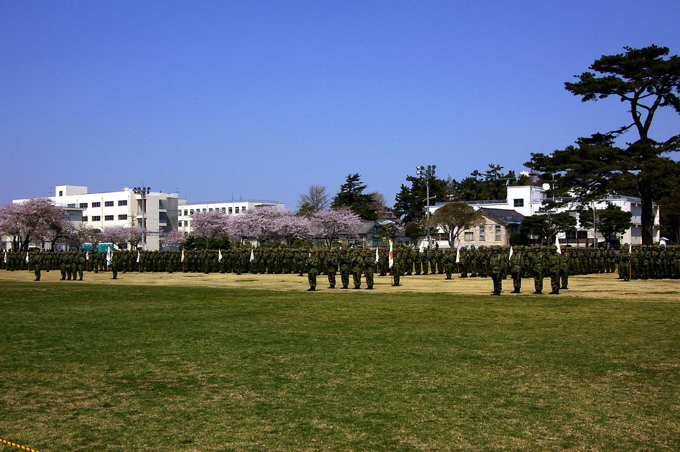 6-Apr-2008, JGSDF Camp Nrashino ja:2008年4月6日、投稿者撮影。陸上自衛隊習志野駐屯地。